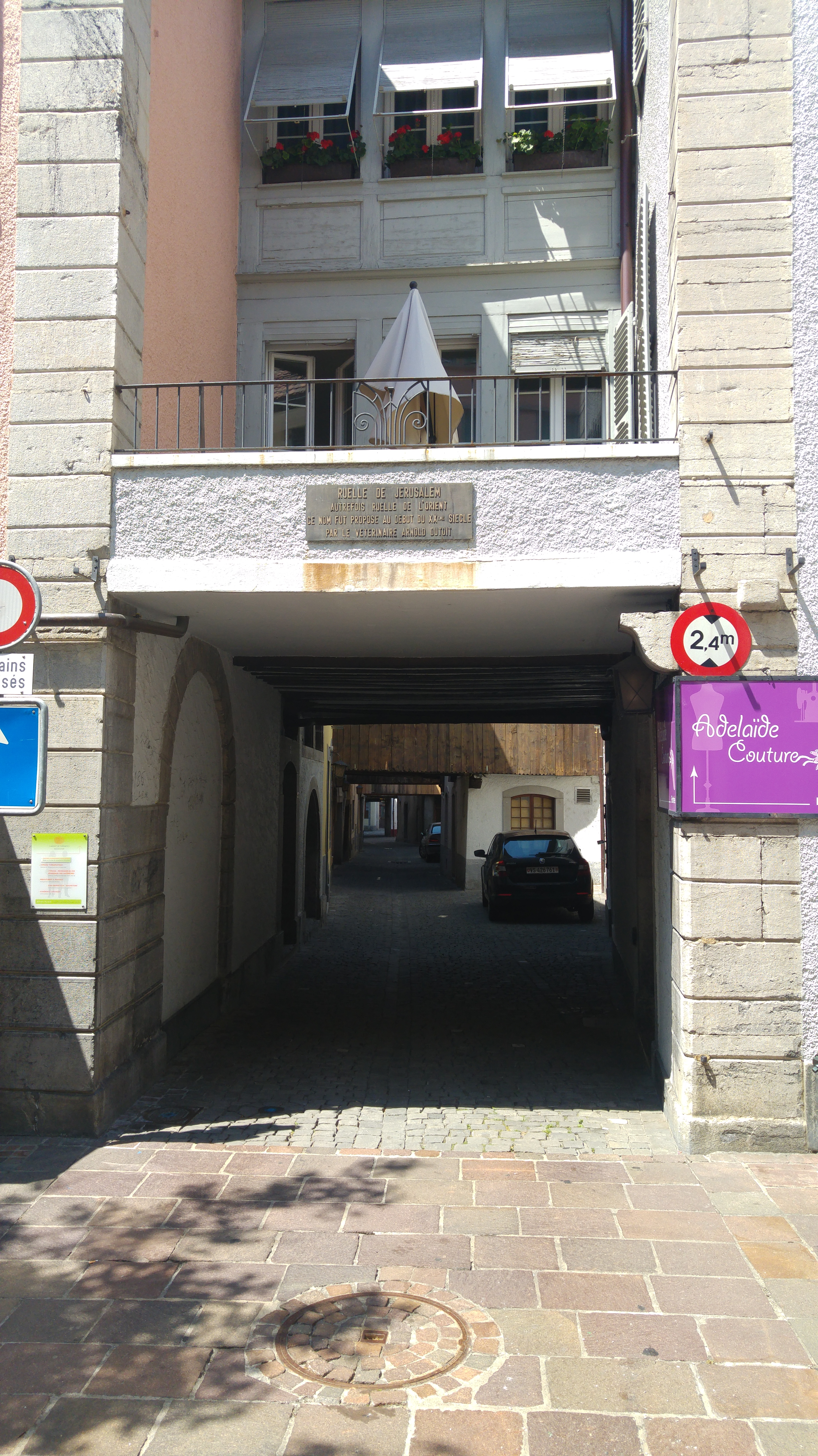 רחוב ירושלים בעיר אגל